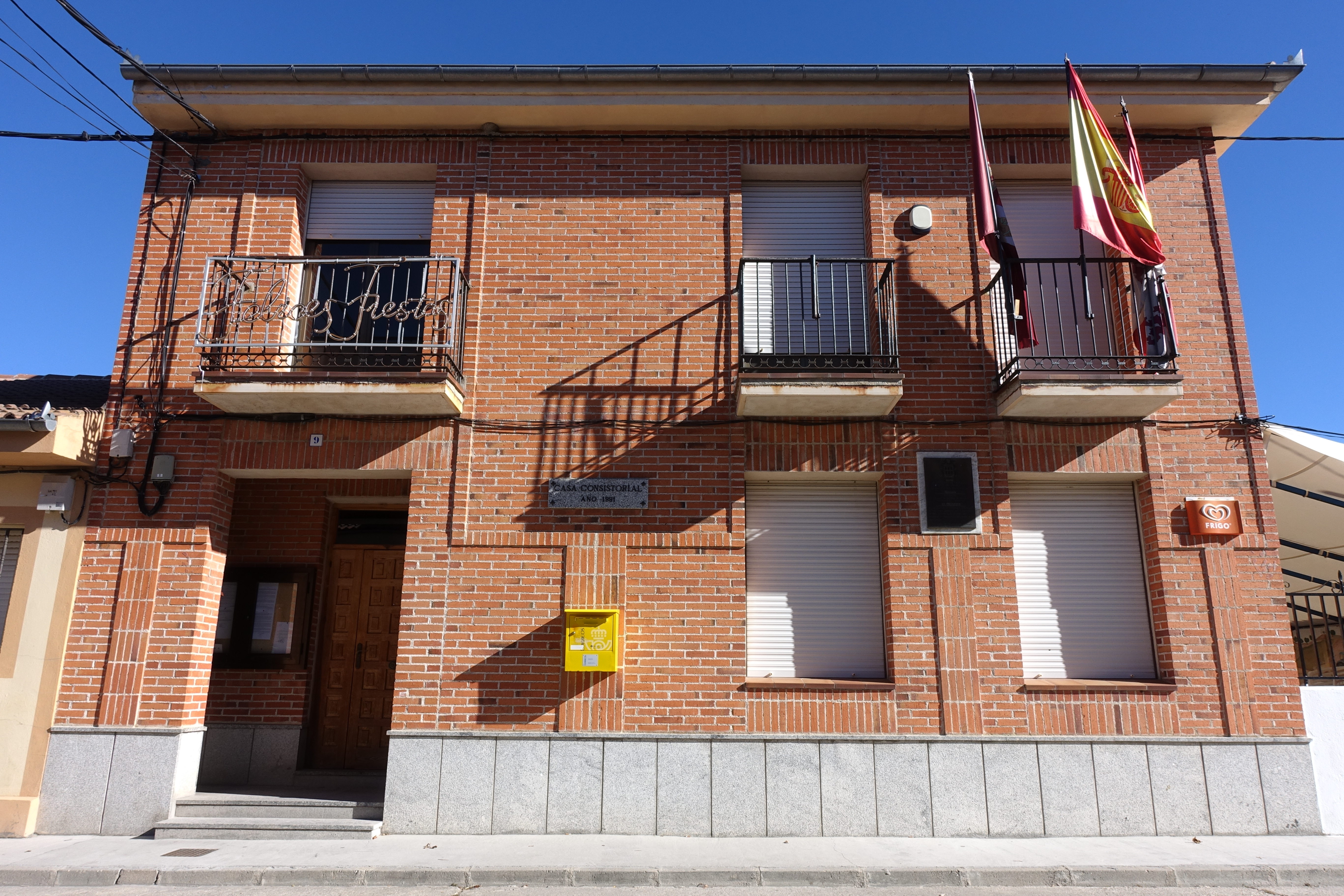 Casa consistorial de Marazuela (Segovia, España).